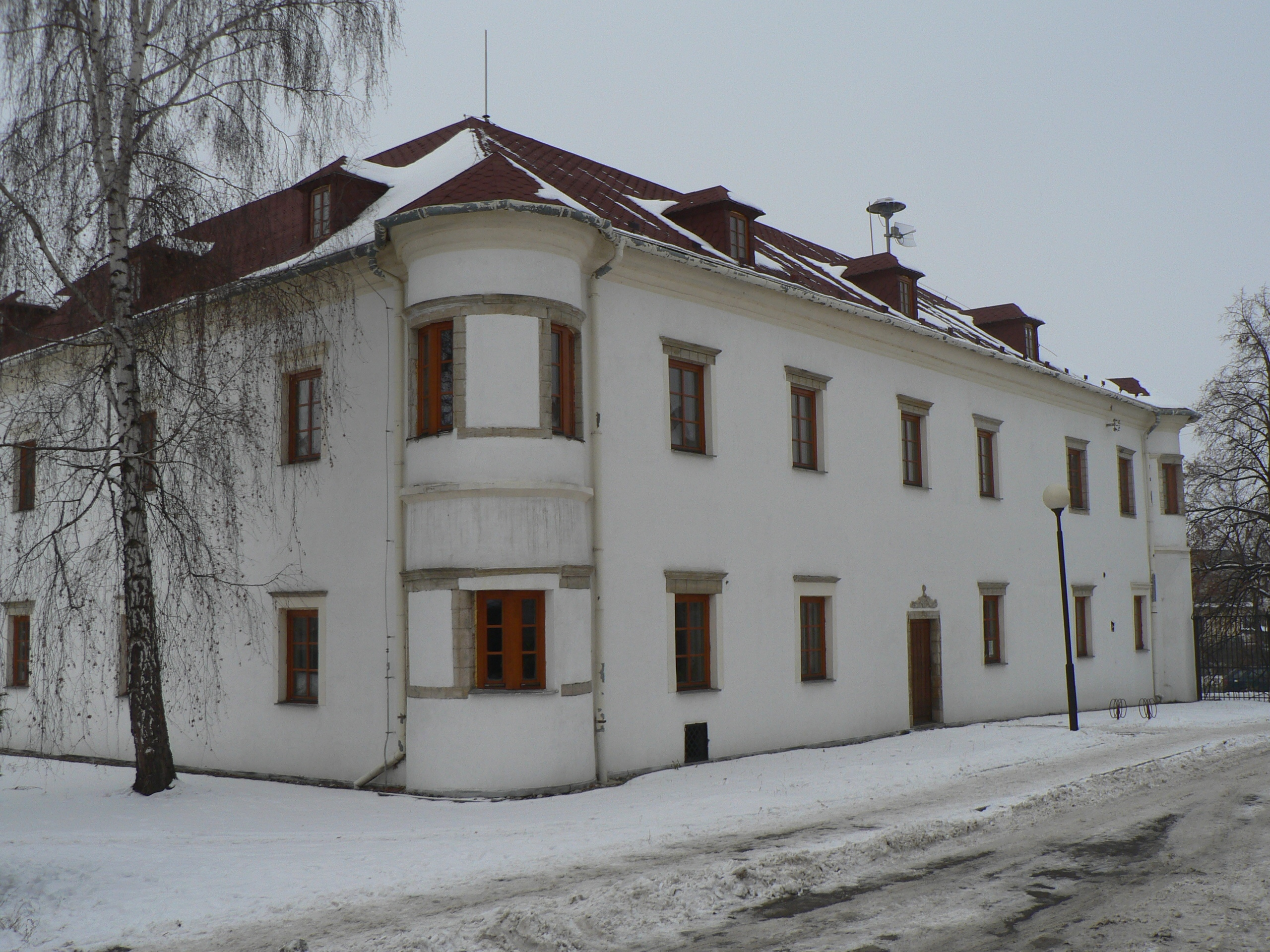 Renesanční zámek v Dlouhé Loučce.